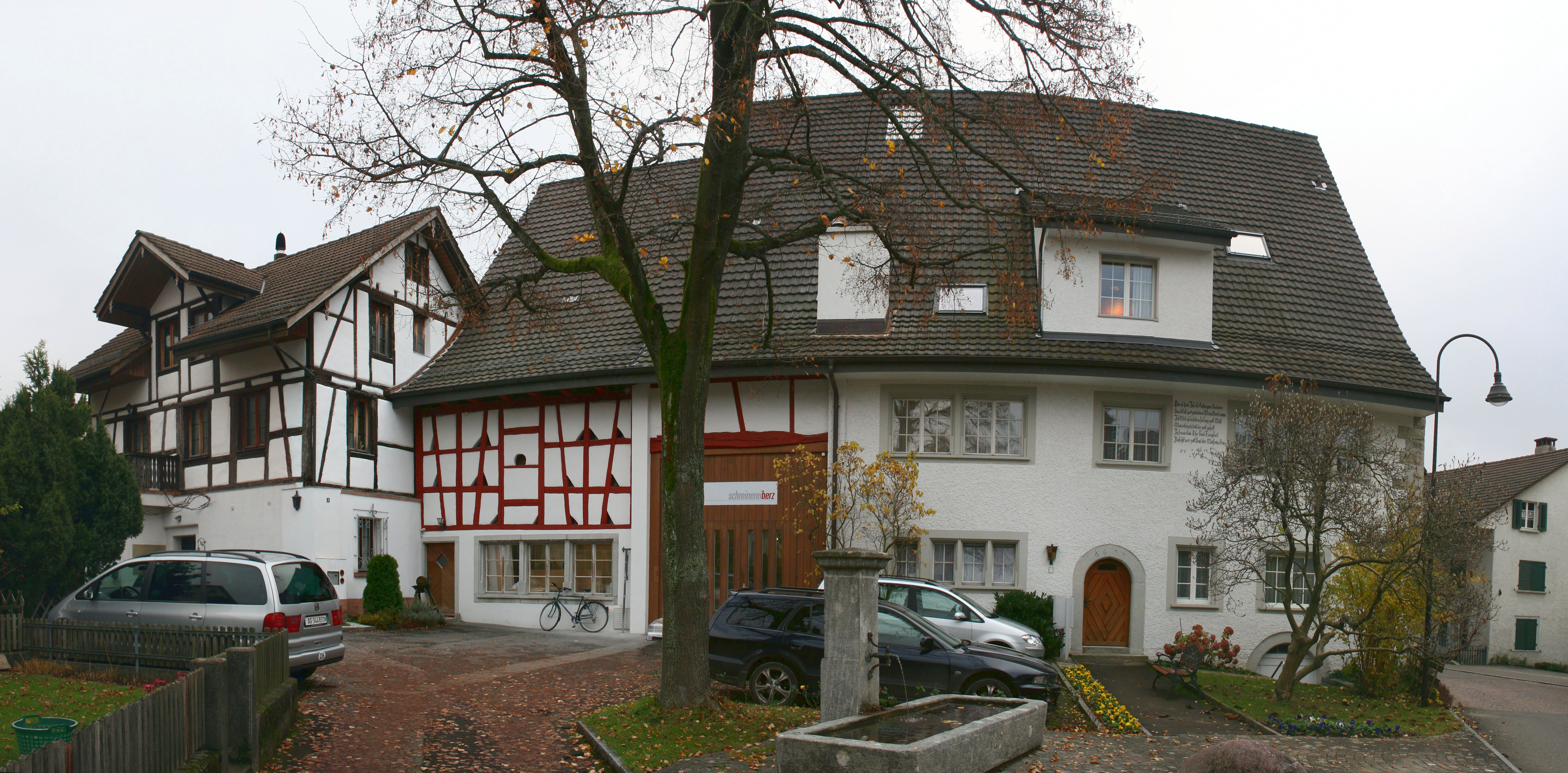 Ehemaliges Zehntenhaus an der Dorfstrasse, Wettingen